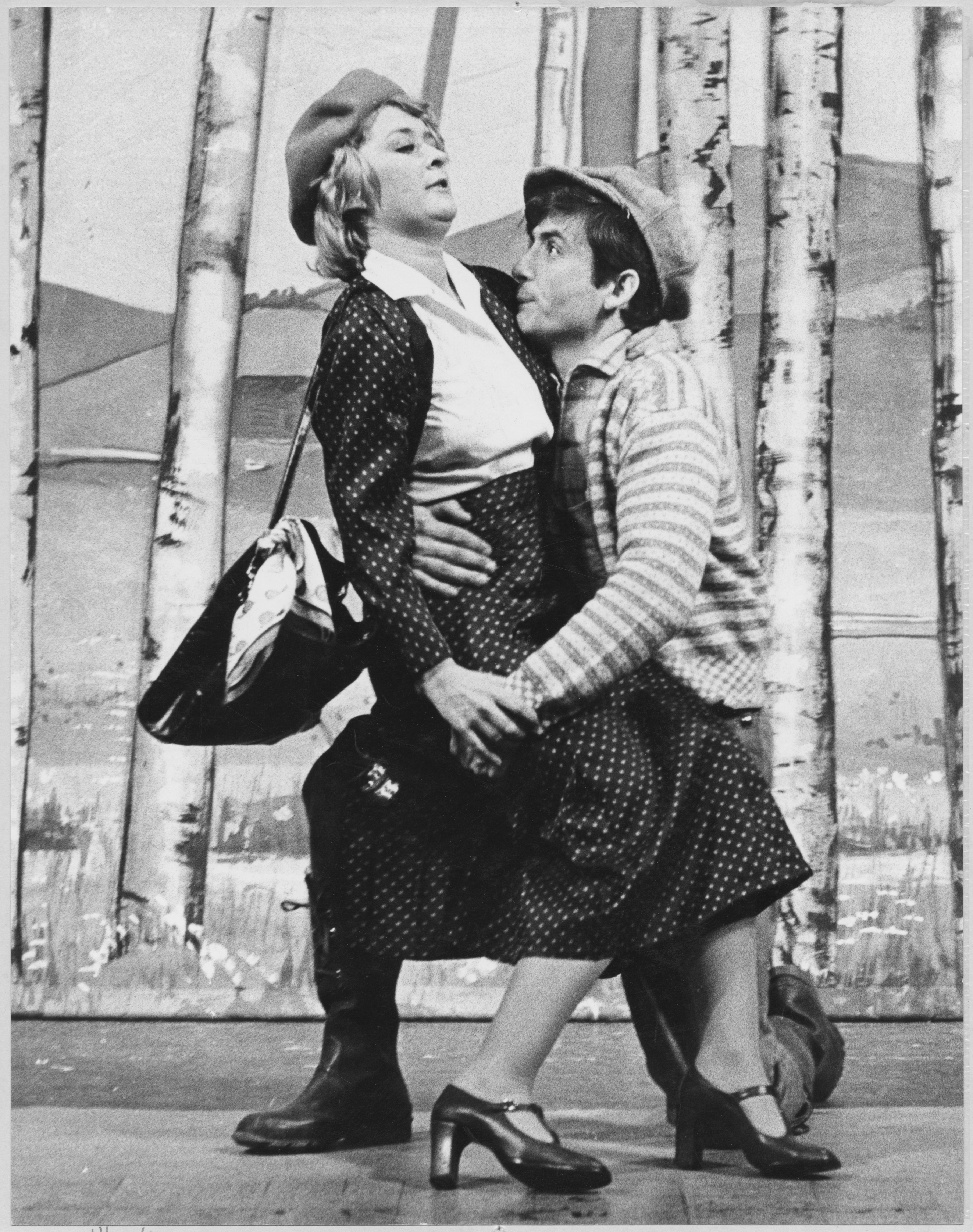 Kirsti Sparboe som Gunvor Smikkstugun og Arne O. Reitan som Hjalmar i Trøndelag teaters oppsetning av musikalen Trost i taklampa. Tekst: Alf Prøysen, Asbjørn Toms. Musikk: Finn Ludt. Premieredato: 9. mai 1975